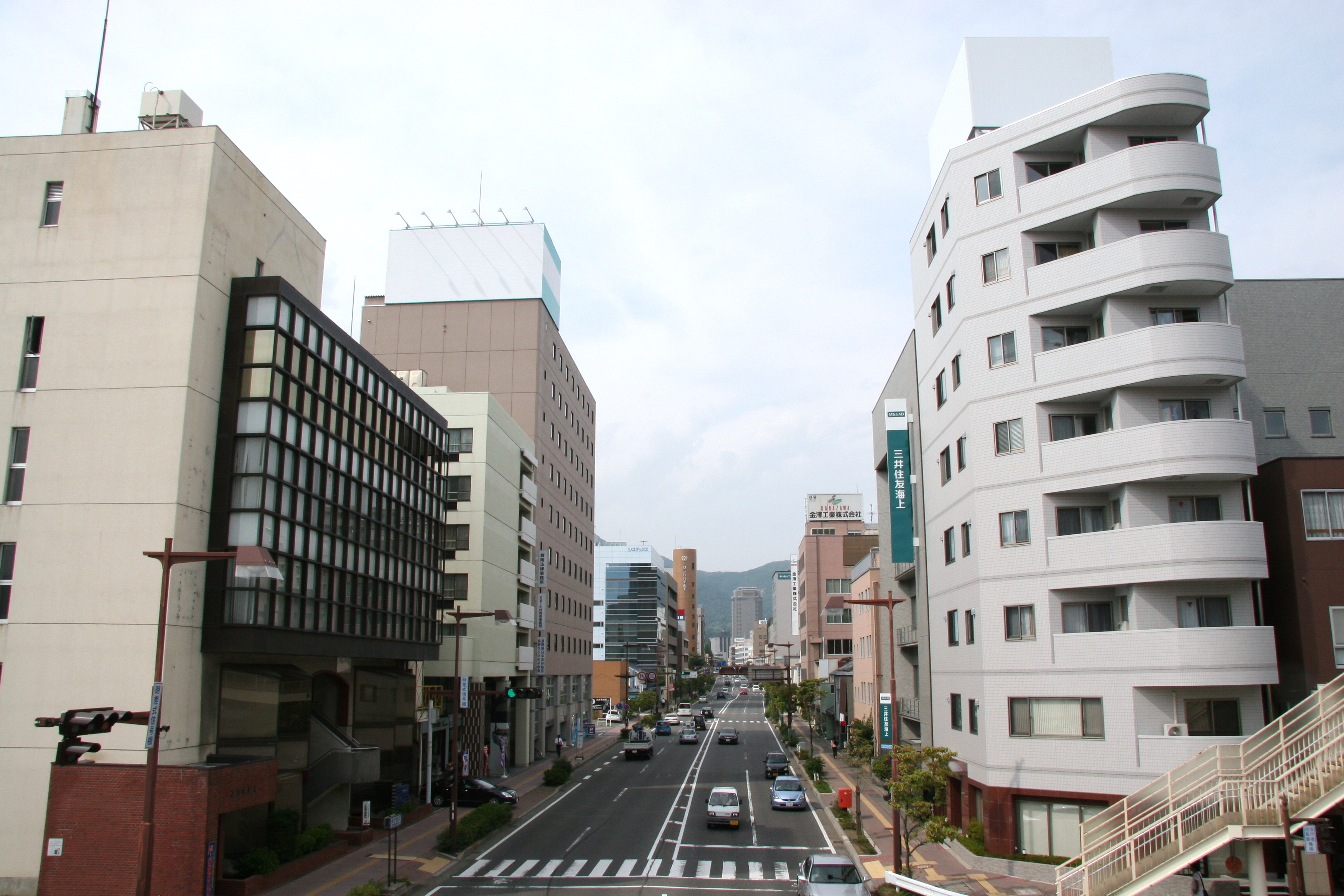 長野県庁通り（国道19号線）